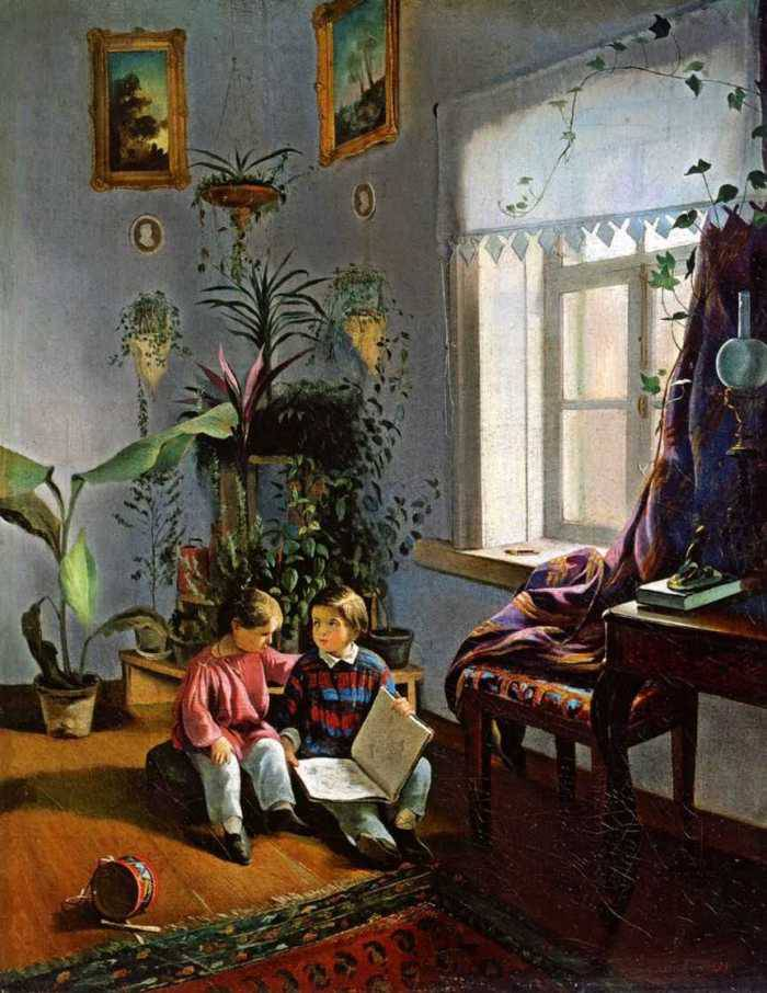 В комнате